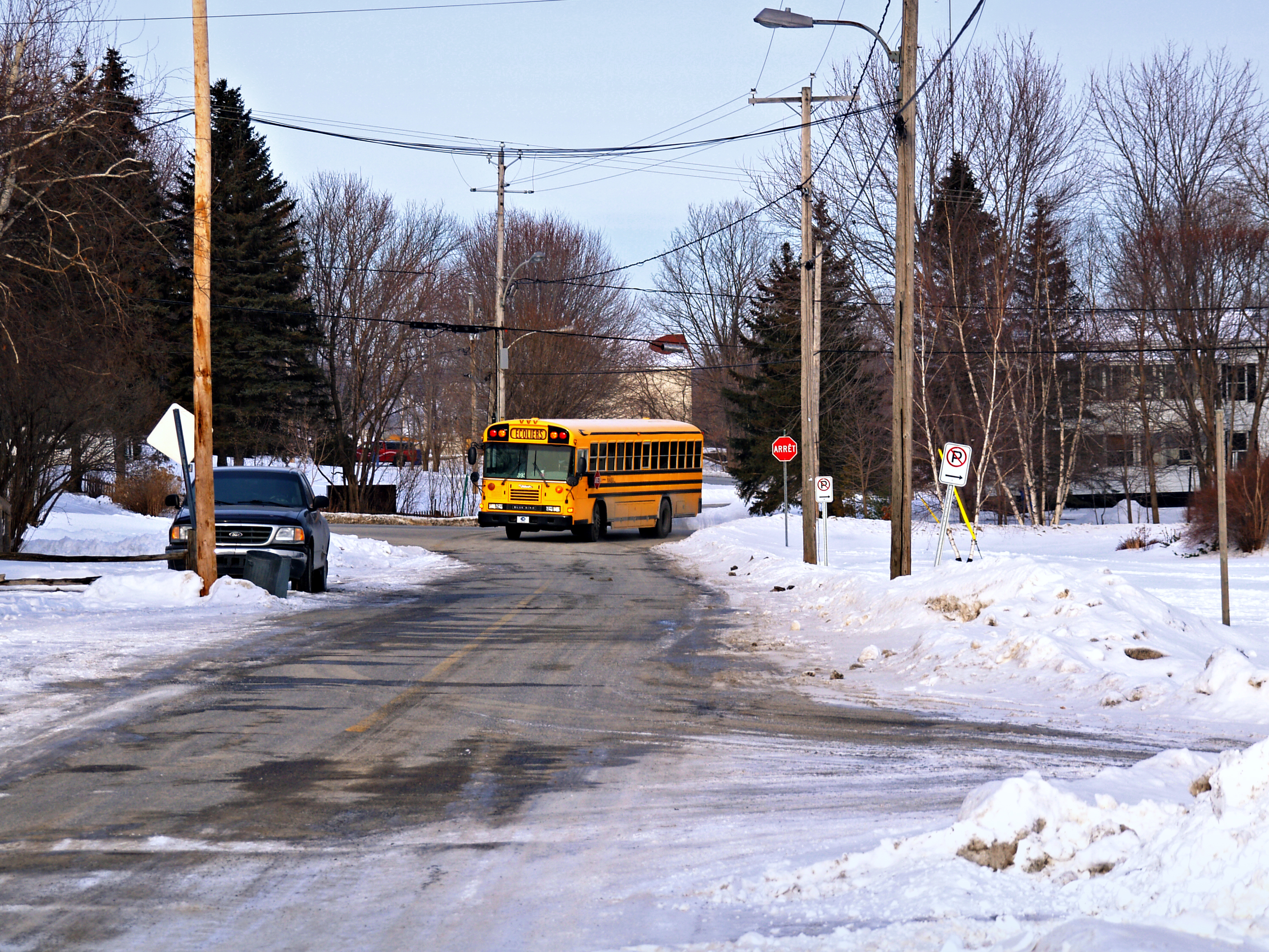 Saint-Armand (Québec) - Bus scolaire au carrefour de l'église